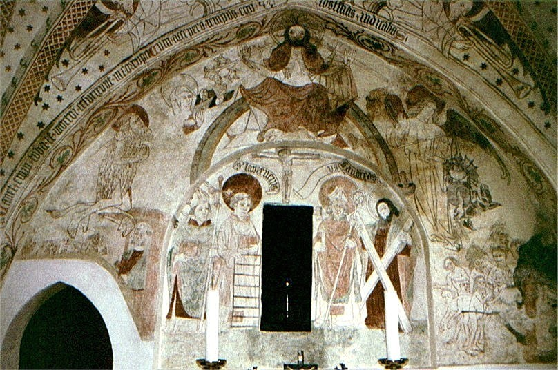 Jetsmark Kirke, korets østvæg